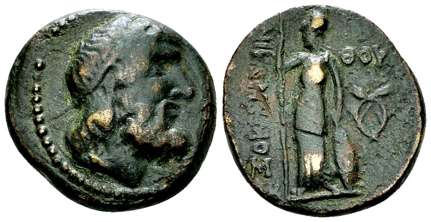 Εξάχαλκο ή Ημιοβολός χάλκινος του Νομισματοκοπείου της Αρχαίας Θουρίας